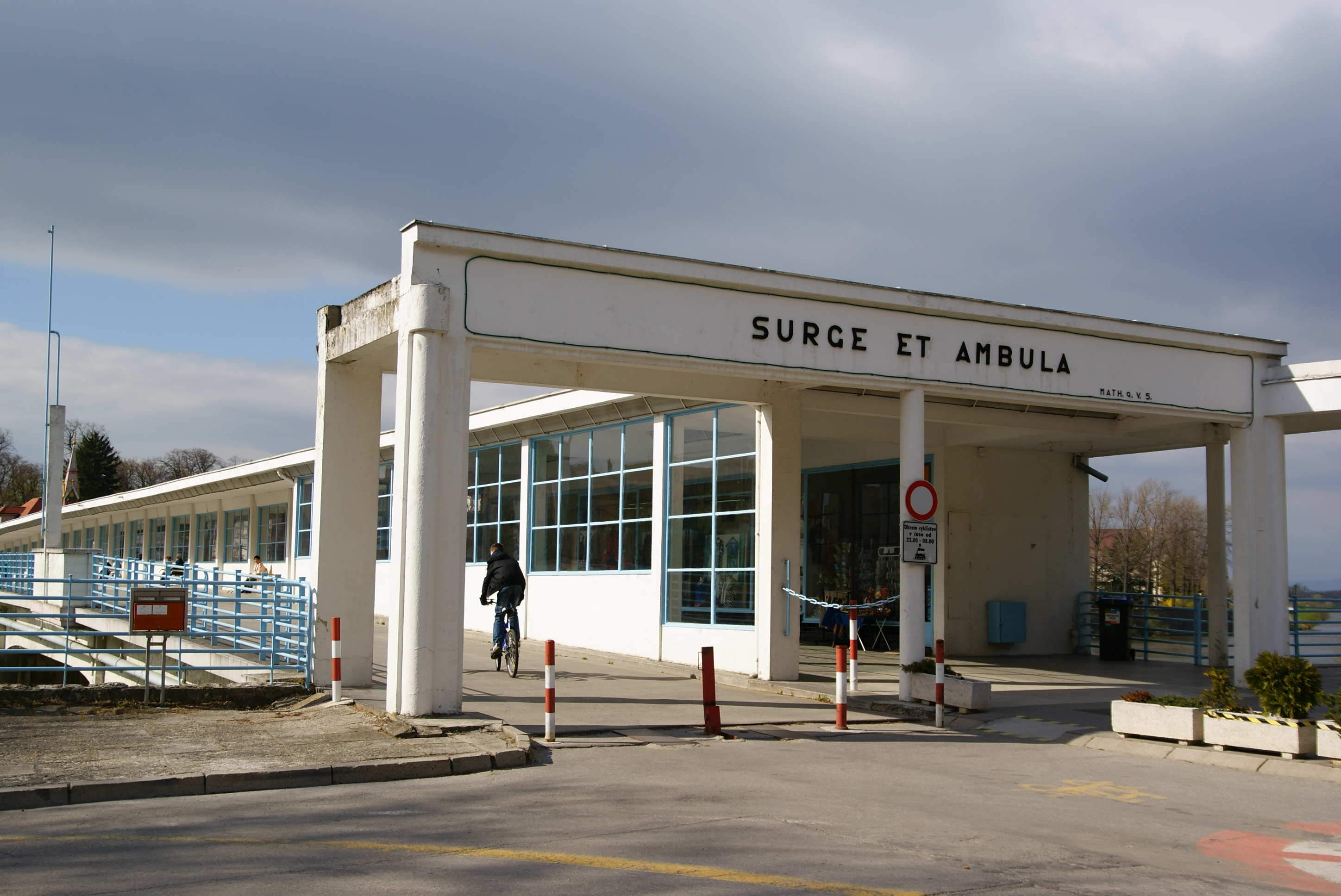 MOST KOLONÁDOVÝ